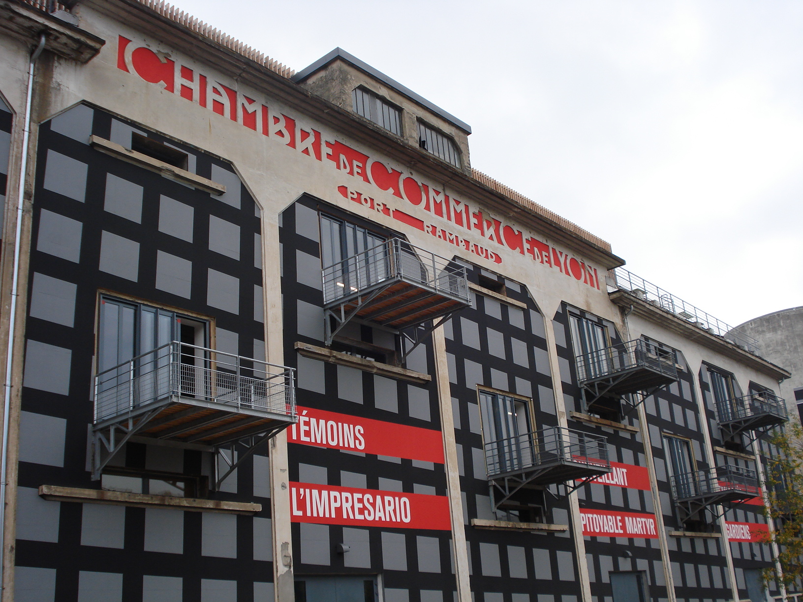 La Sucrière, Quai Rambaud, Lyon Biennale d'Art Contemporain 2011